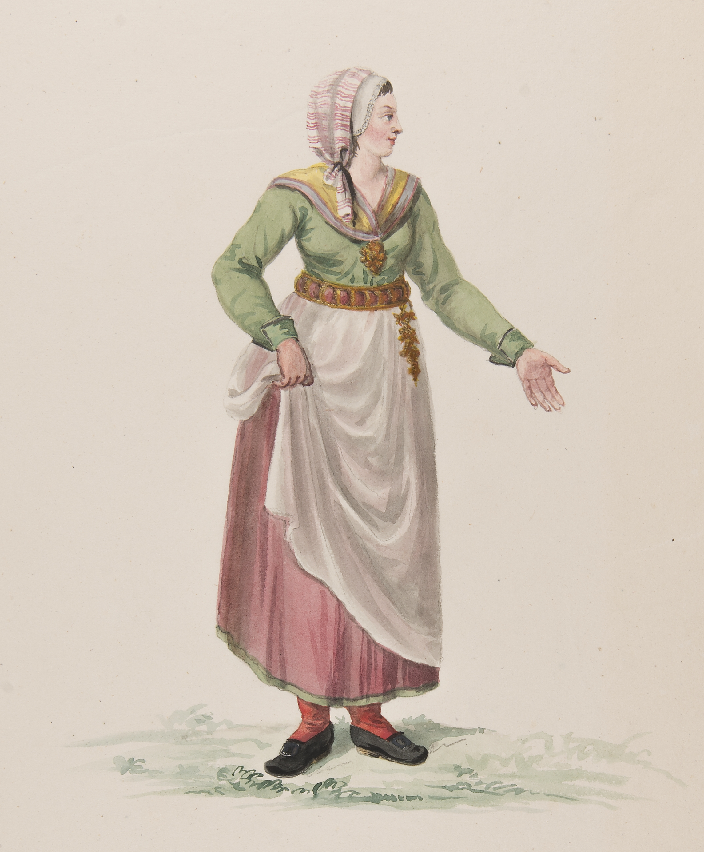 Kvinna dräkt. Akvarell i storformat av C.W. Swedman. Depicted place: Sweden (Q34) (Land), Småland (Q199957) (Landskap)